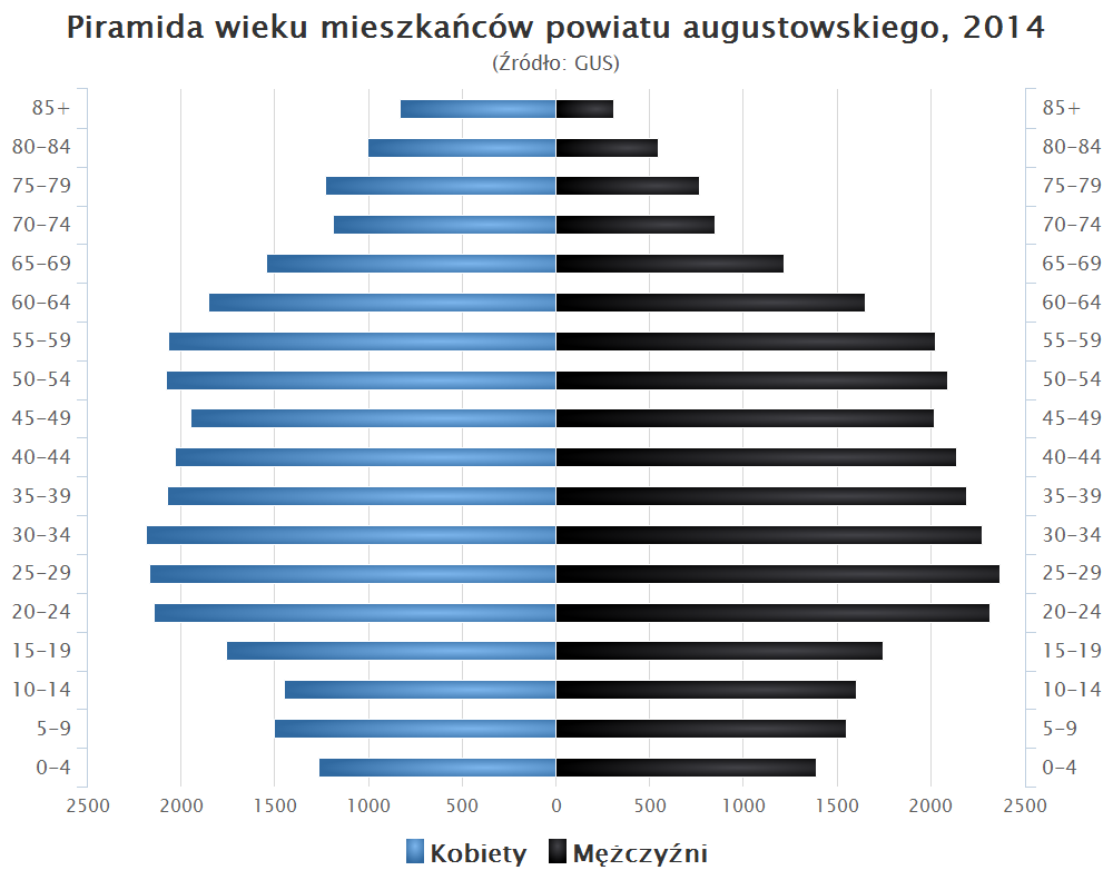 Piramida wieku mieszkańców powiatu augustowskiego, 2014